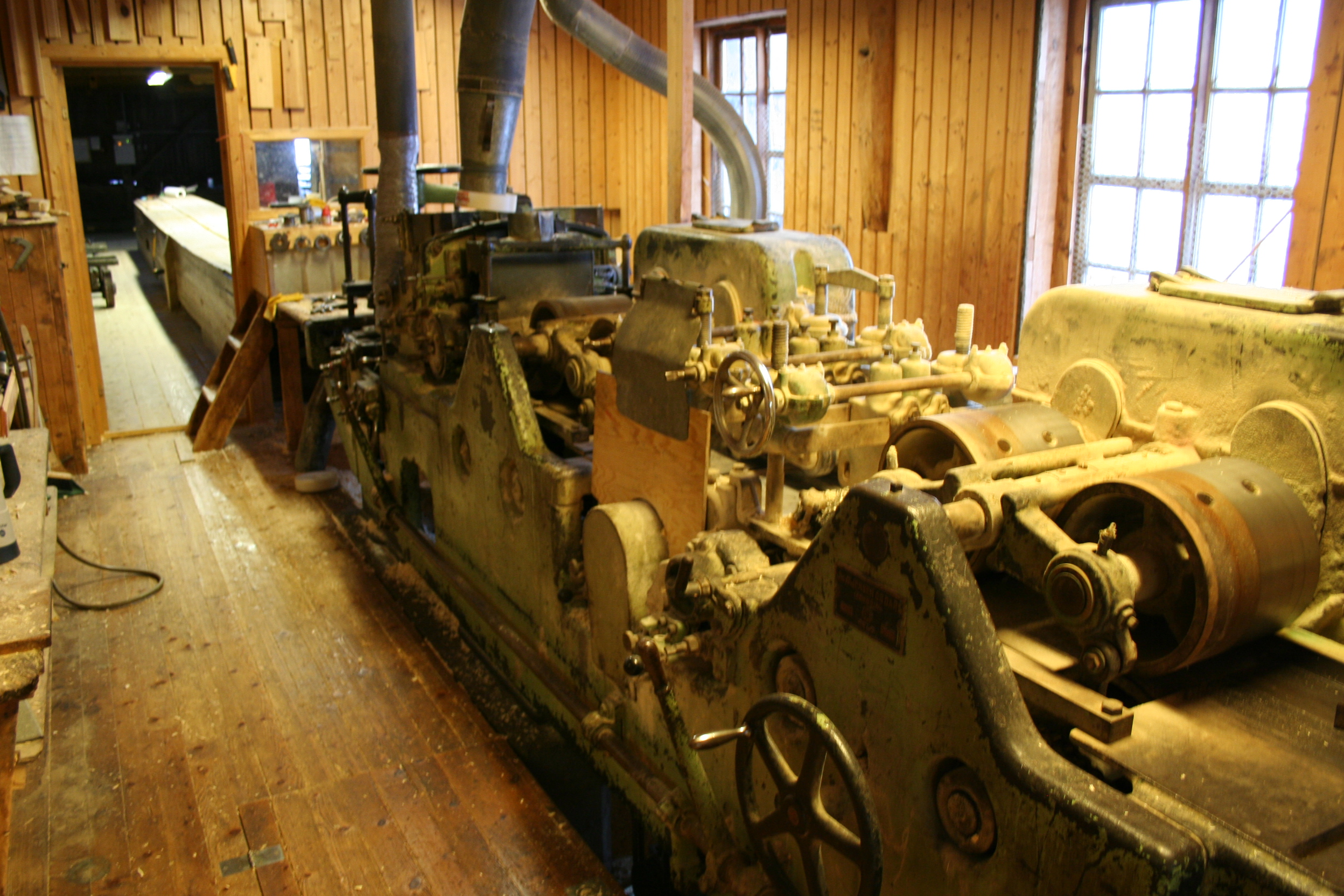 Høvelen ved Spillum Dampsag & Høvleri.